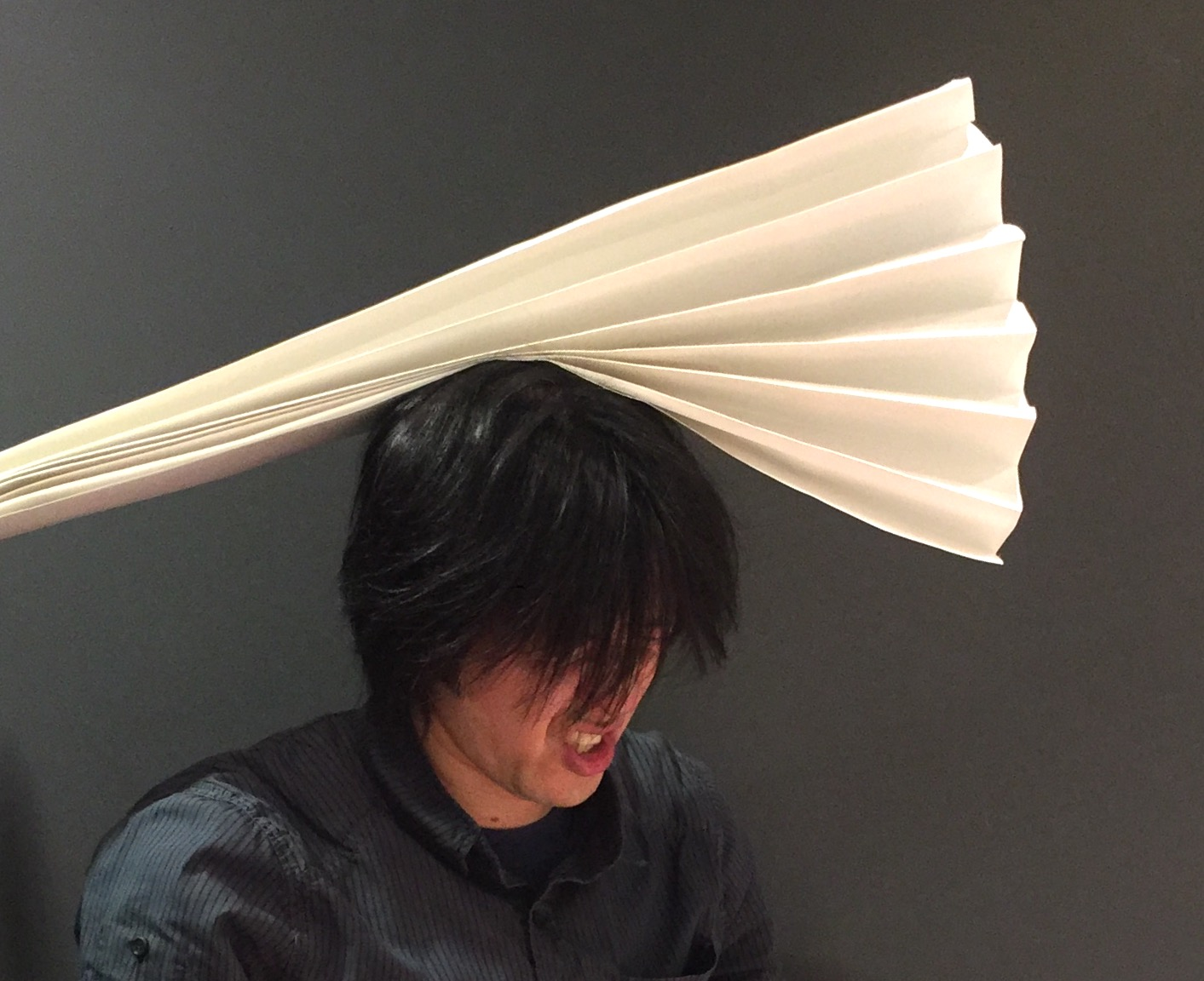 ハリセンが頭部に炸裂した瞬間